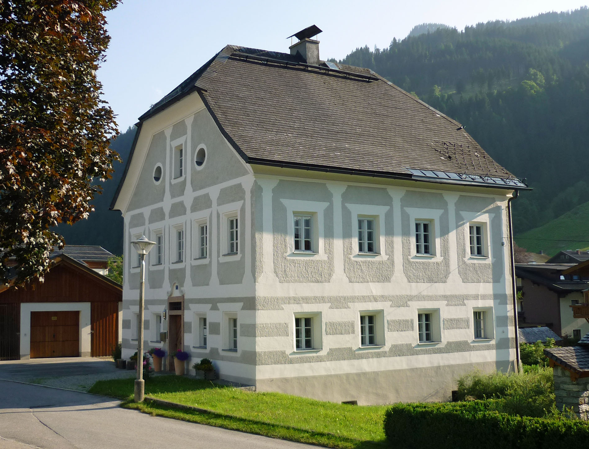 Pfarrhaus Kleinarl